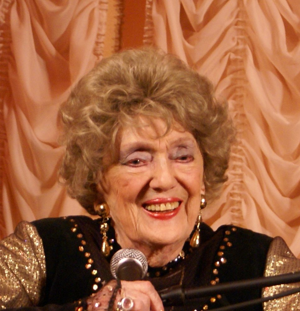 Концерт Аллы Баяновой. "Дом романса" Преображенской Г. 23.11.2007